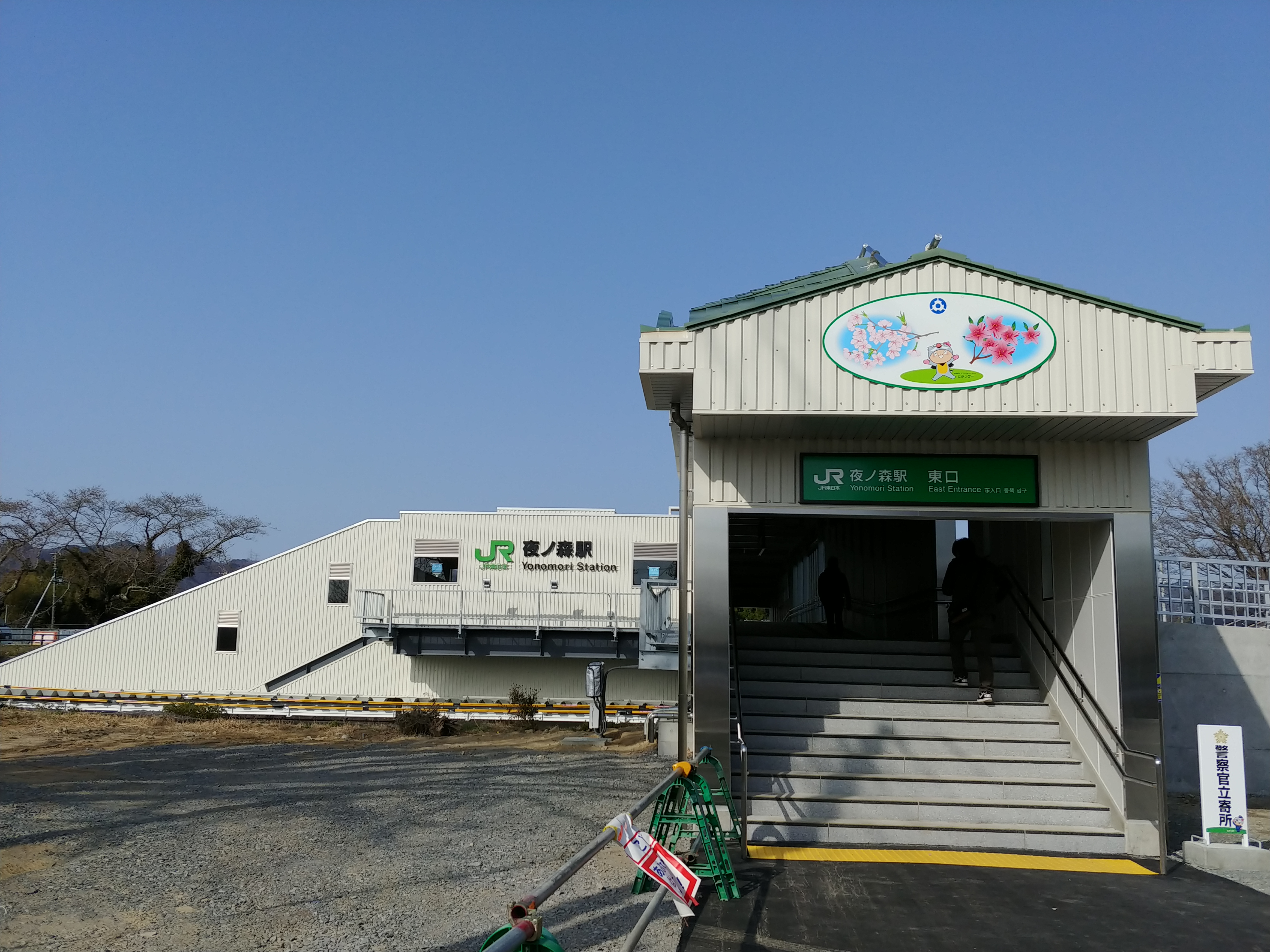 夜ノ森駅東口新駅舎。